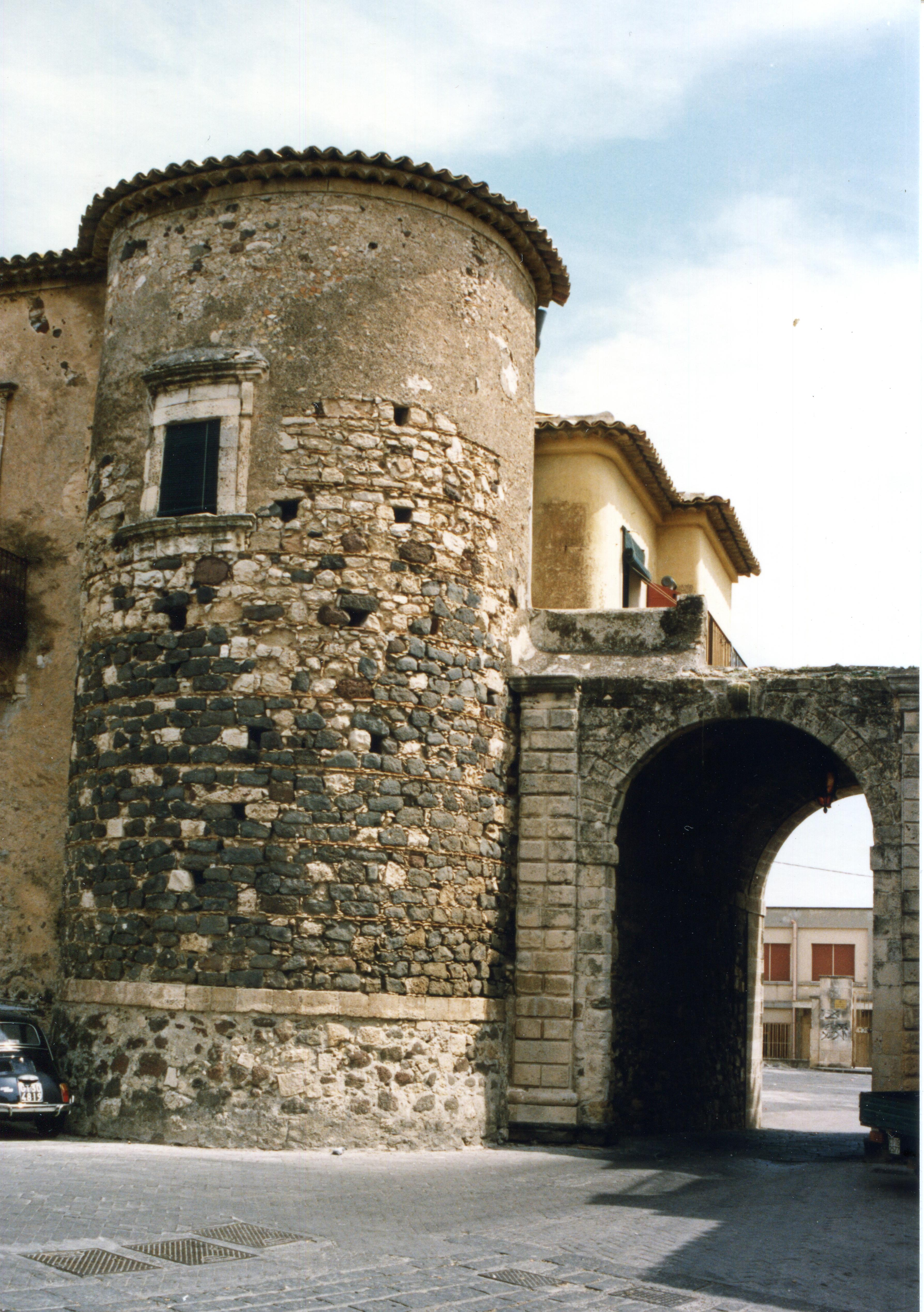 Militello. Porta della città medievale e torre angolare del castello Barresi-Branciforte (XIV-XVII sec.).